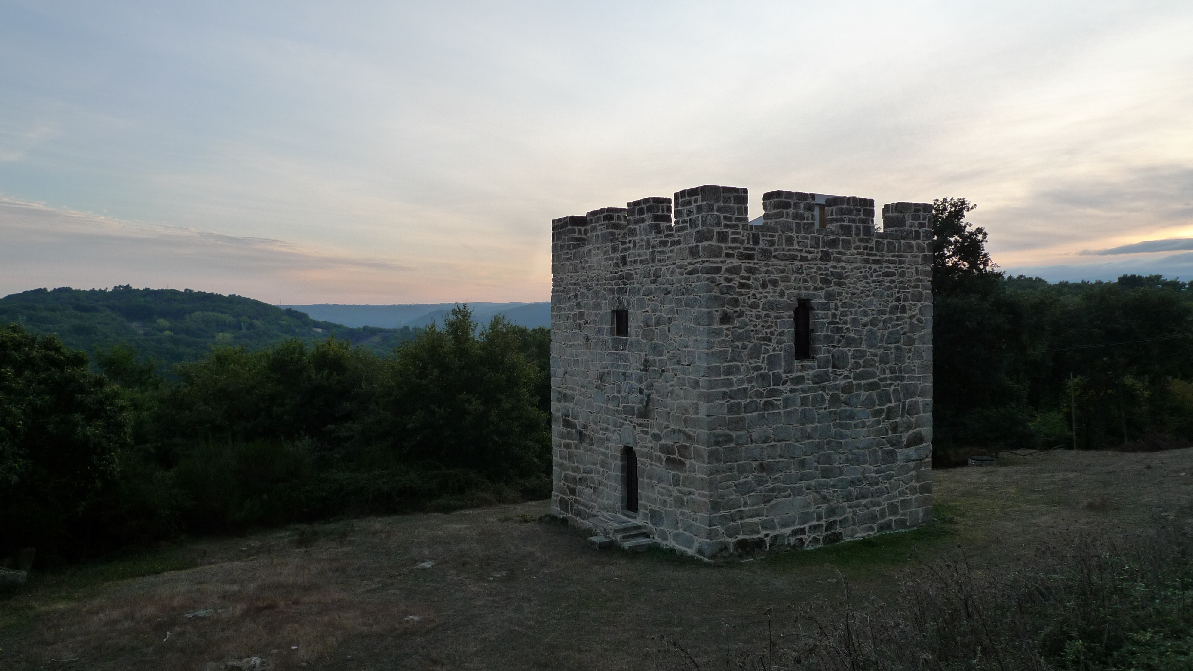 Vista da Torre da Candaira